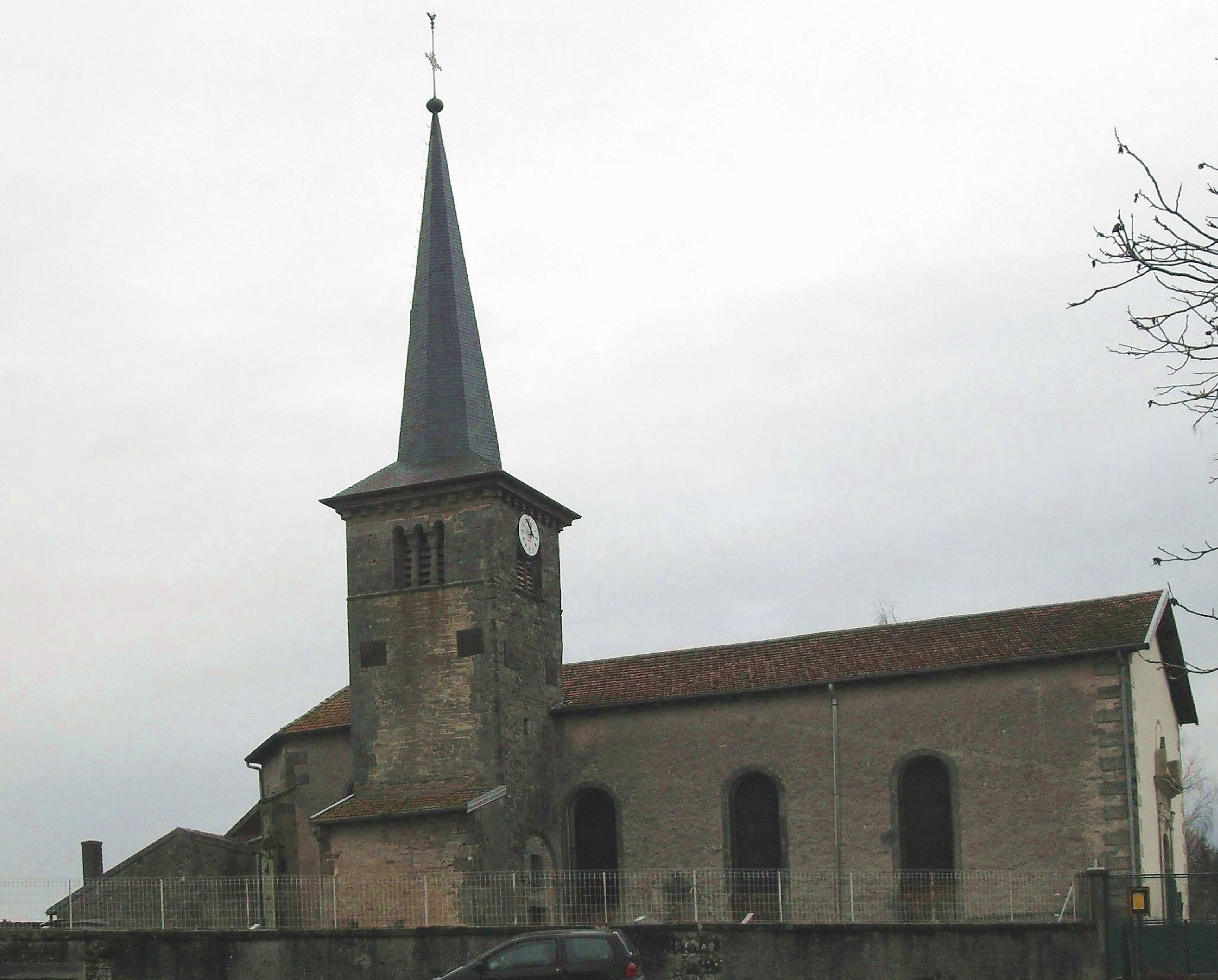 L'église Saint-Martin à Hennecourt